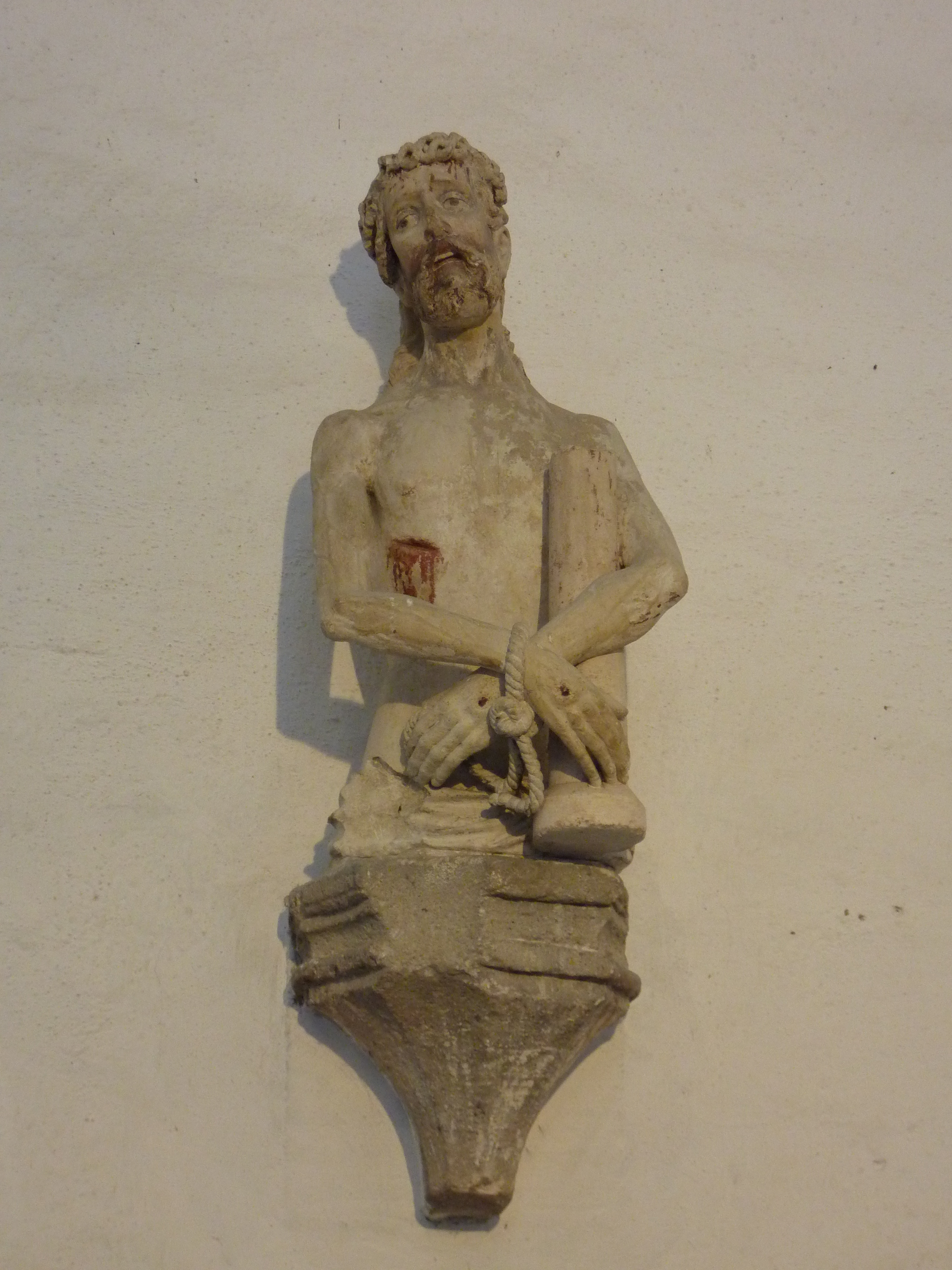 Filialkirche in St. Michael, Weißenkirchen in der Wachau, Niederösterreich - Schmerzensmann (um 1420)